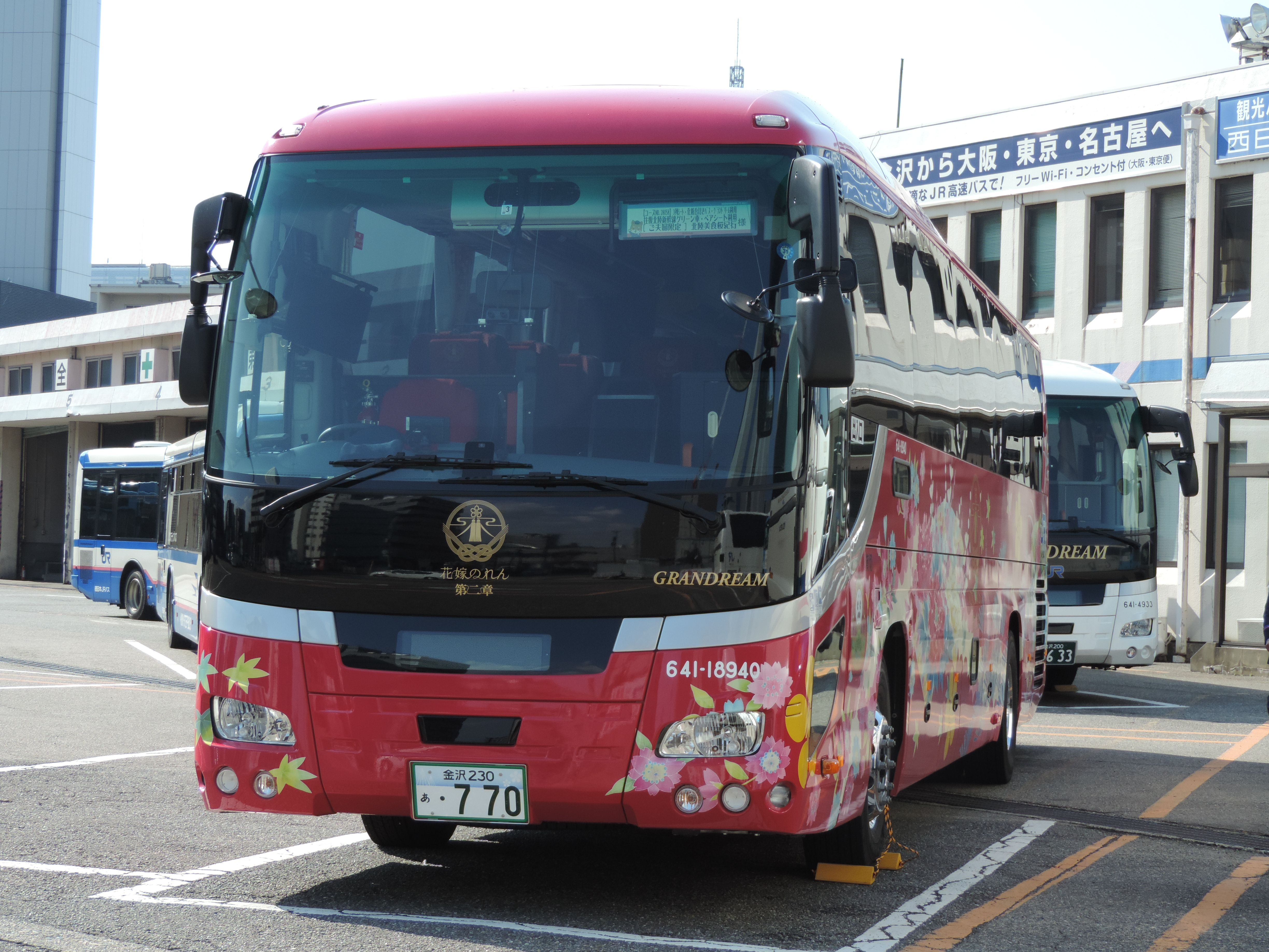 西日本ジェイアールバス金沢営業所にて撮影